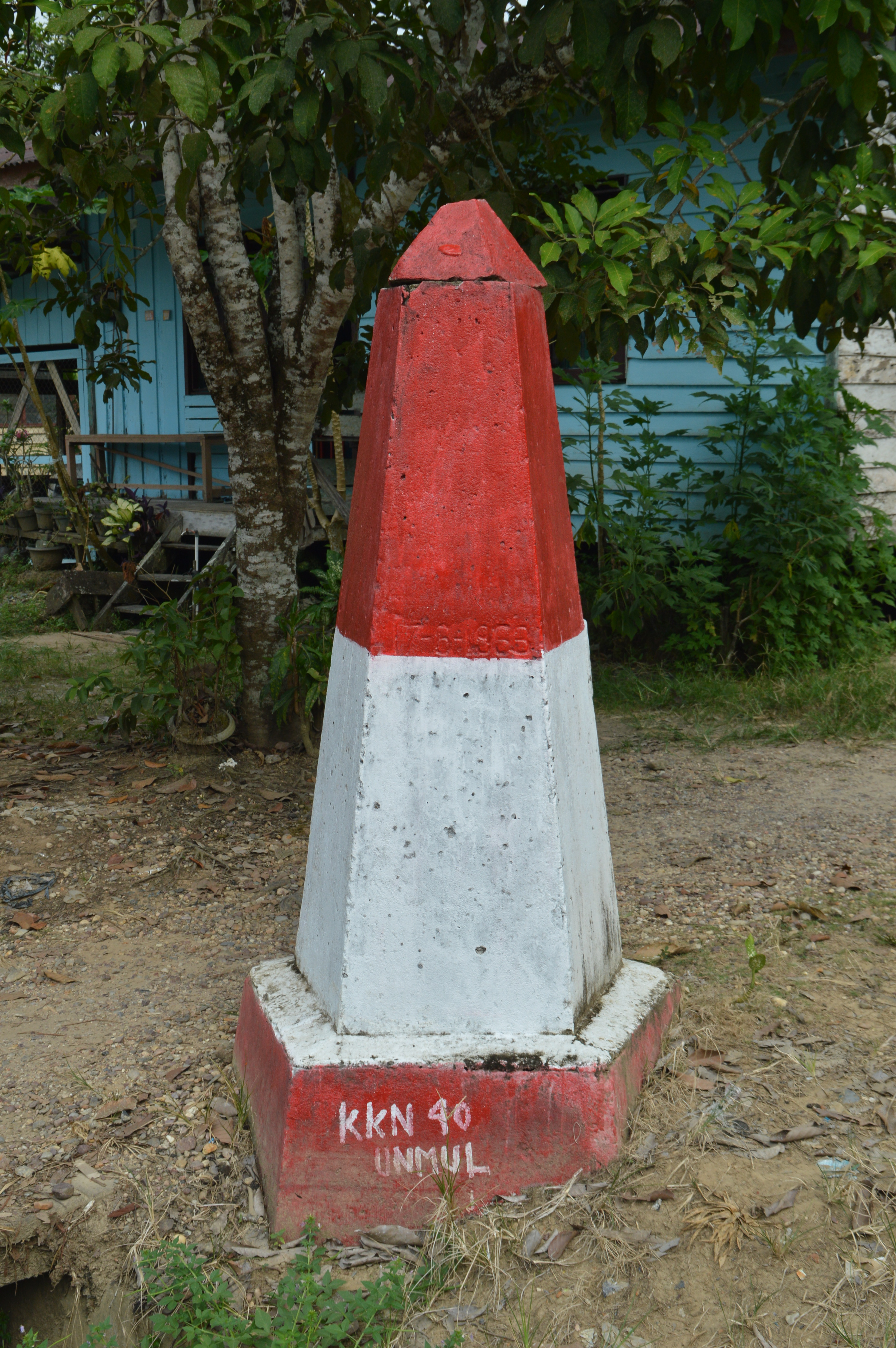 Tugu Khatulistiwa di kecamatan Long Iram, Kabupaten Kutai Barat, Kalimantan Timur.